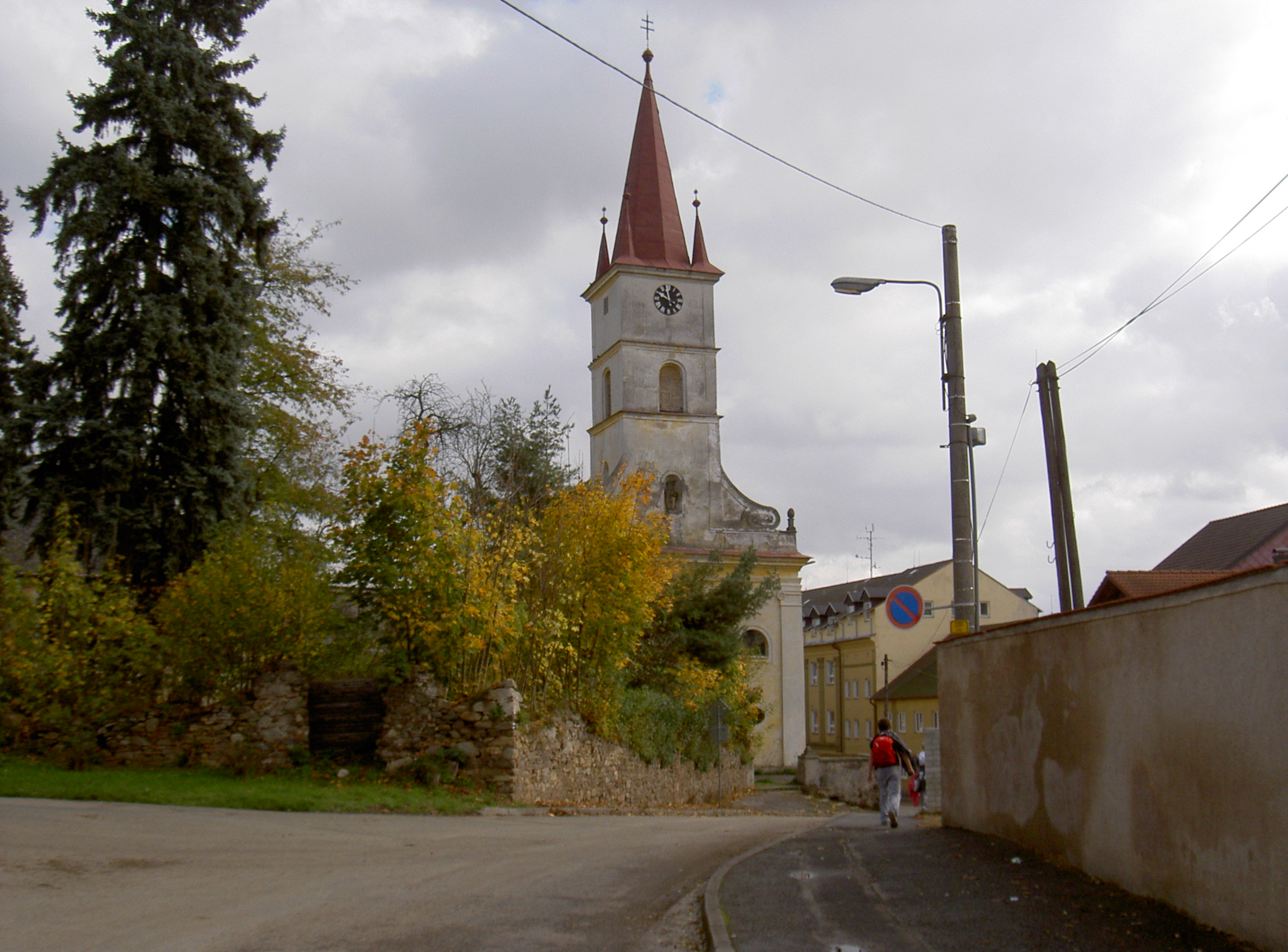 Jakobskirche in Hostouň